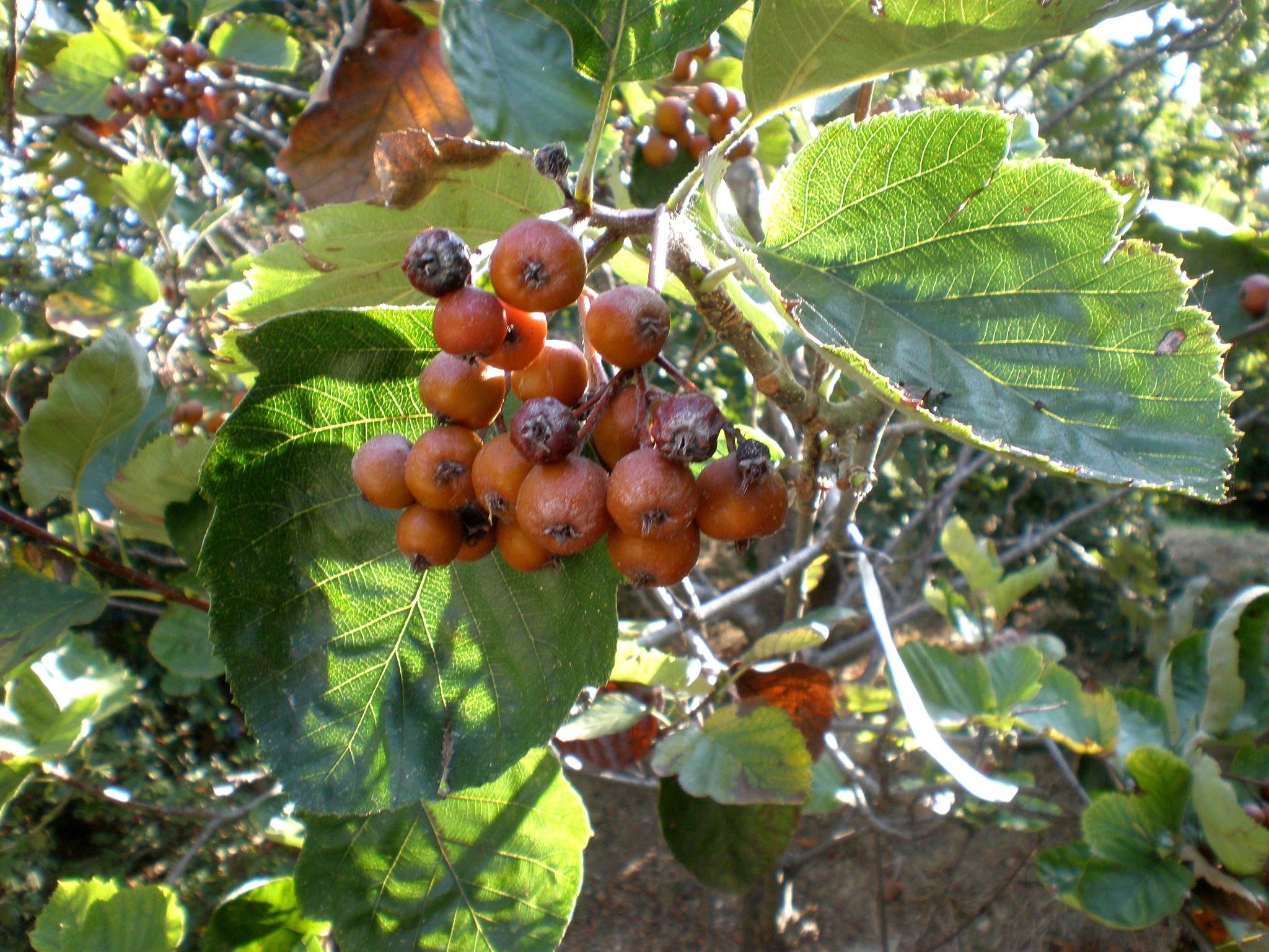 Jardín Botánico de Barcelona.